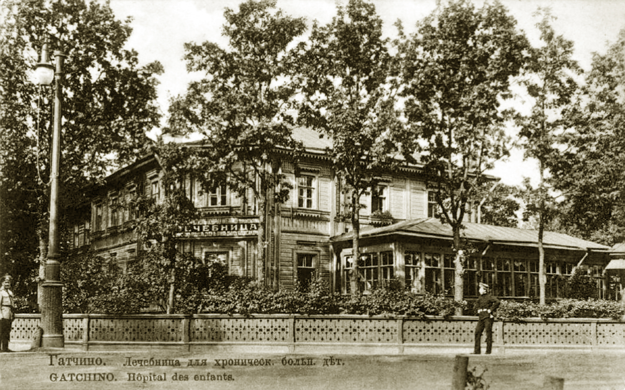 Гатчина. Лечебница для хронически больных детей, учрежденная в 1883 г. в память девицы Александры Ковальской.